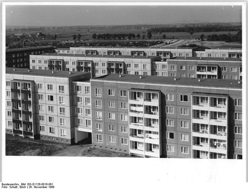 Hoyerswerda, Wohnkomplex Künichter Heide I DDR B-Hoyerswerda 1968 Zentralbild-Schutt 26.11.1968 Cottbus: Sozialistische Wohnstadt Hoyerswerda - Wohnkomplex Kühnichter Heide.